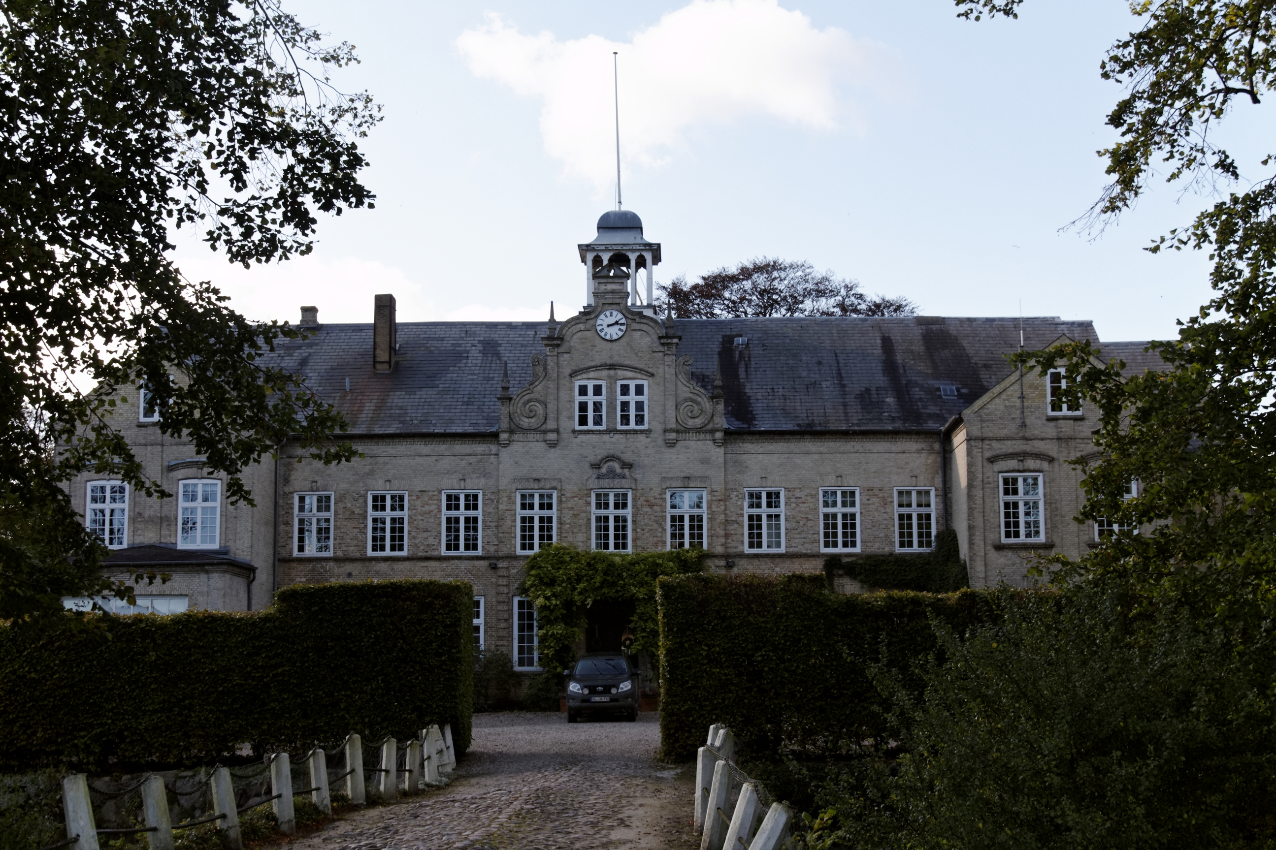 Herrenhaus Gut Buckhagen in Rabel This is a photograph of an architectural monument.